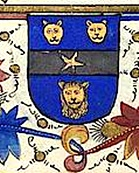 Wappen der italienischen Adelsfamilie de Clapis